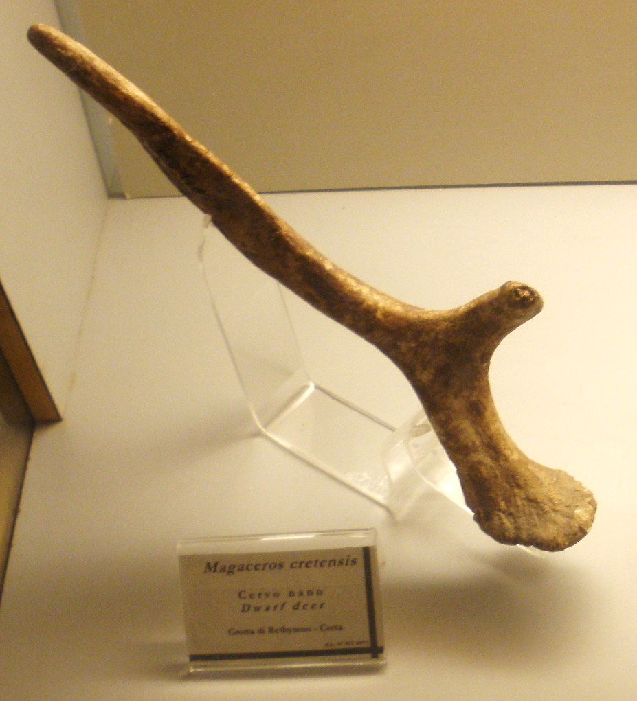 Fossil of Megaloceros cretensis, an extinct mammal- Took the picture at Museo di Paleontologia di Firenze